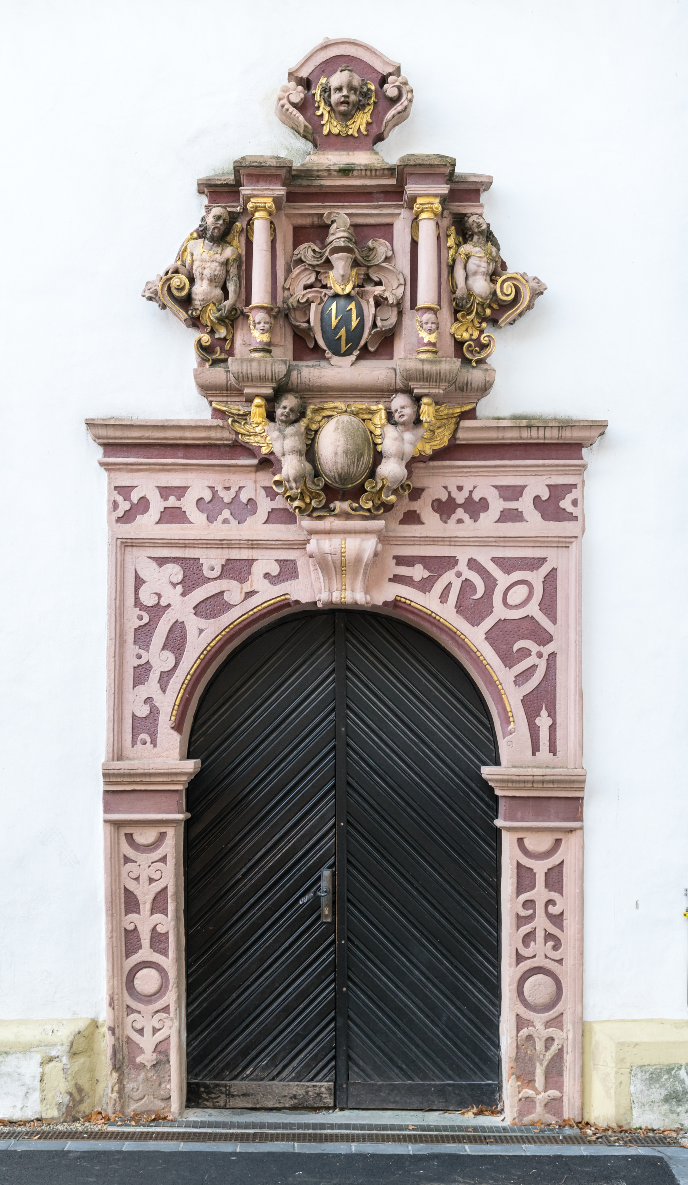 Gymnasium Theodorianum in Paderborn